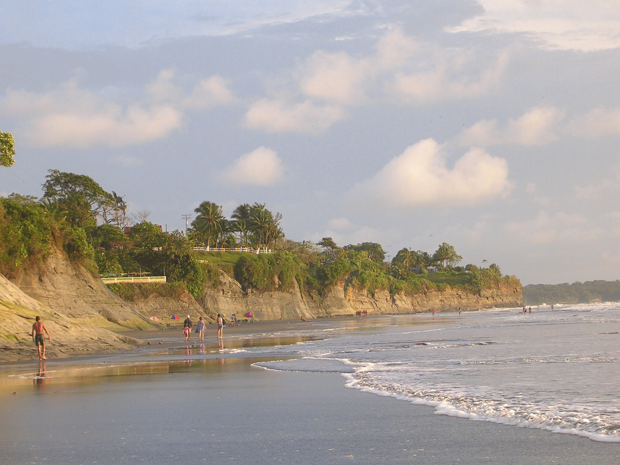 vista parcial de playas de ladrilleros en colombia (por: j.d.a.)